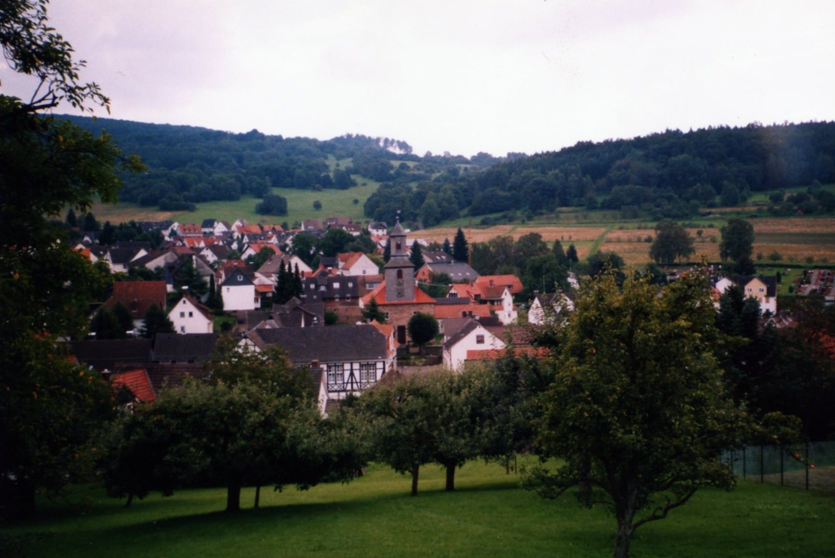 Wickenröder Kirche, vom Böllenberg aus fotografiert